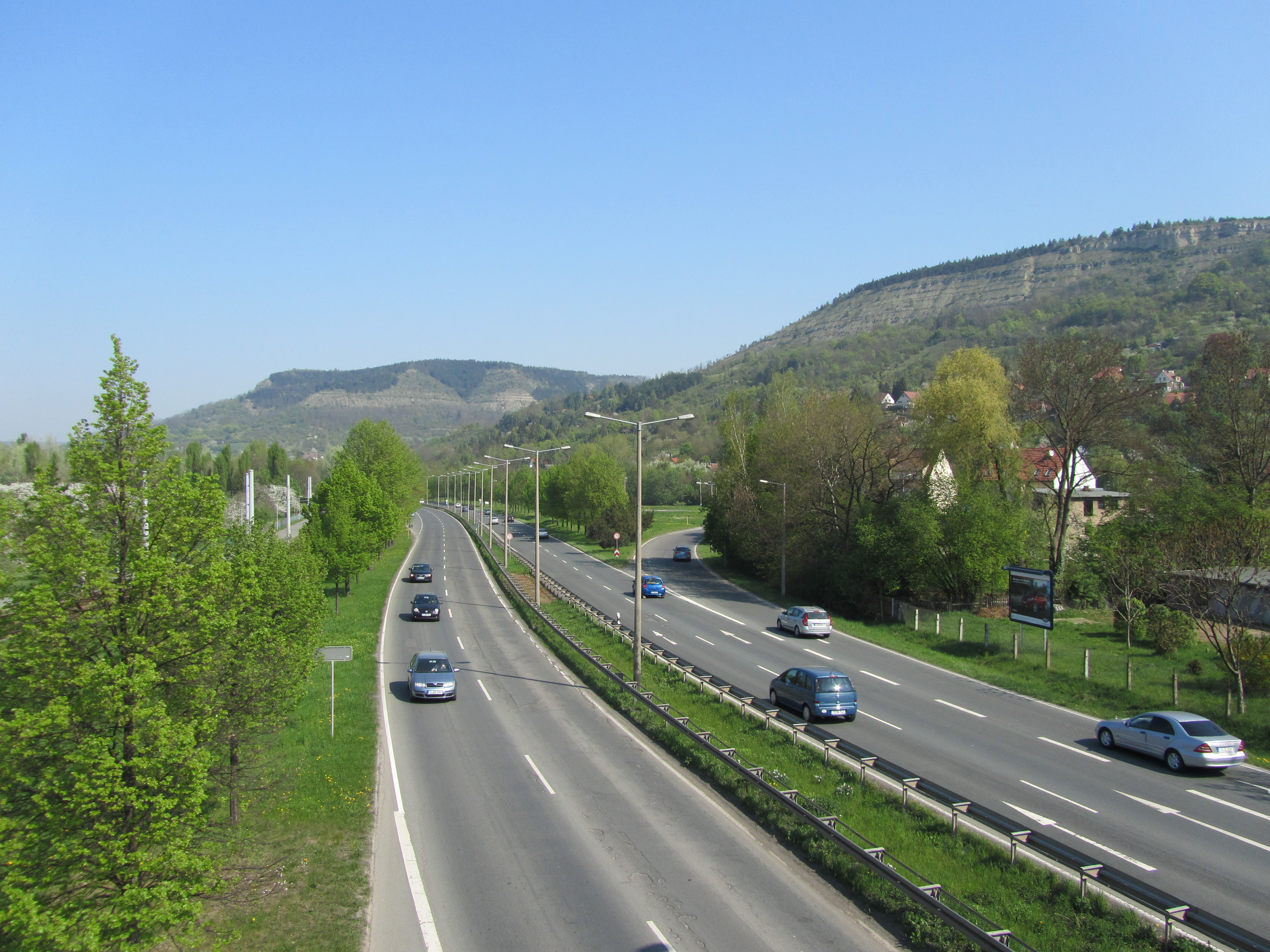 Die Stadtrodaer Straße in Jena mit den Kernbergen im Hintergrund.